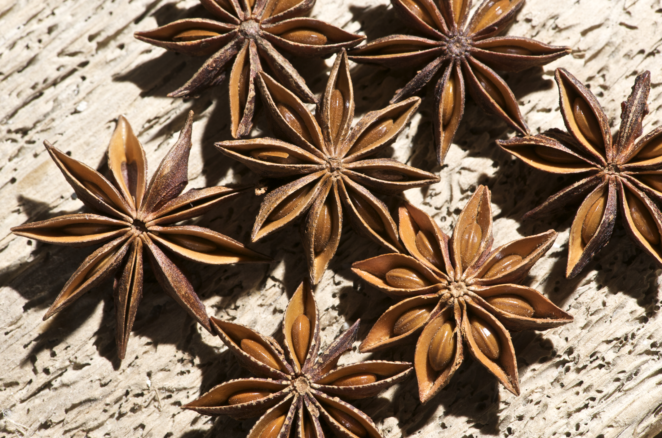 Star Anise Series